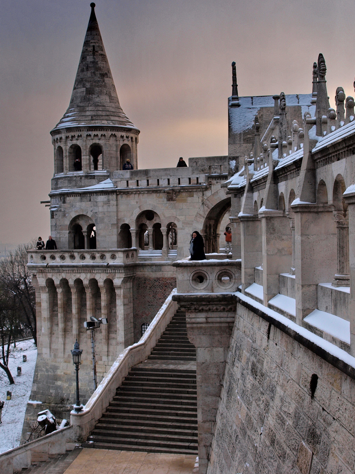 Halászbástya épülete díszlépcsővel (Budapest 1, Halászbástya) This is a photo of a monument in Hungary. Identifier: 103